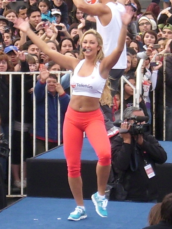 La modelo Francesca Cigna ("Blanquita Nieves") participando del show de la Teletón en la Plaza de Armas de Maipú el sábado 3 de diciembre de 2011.